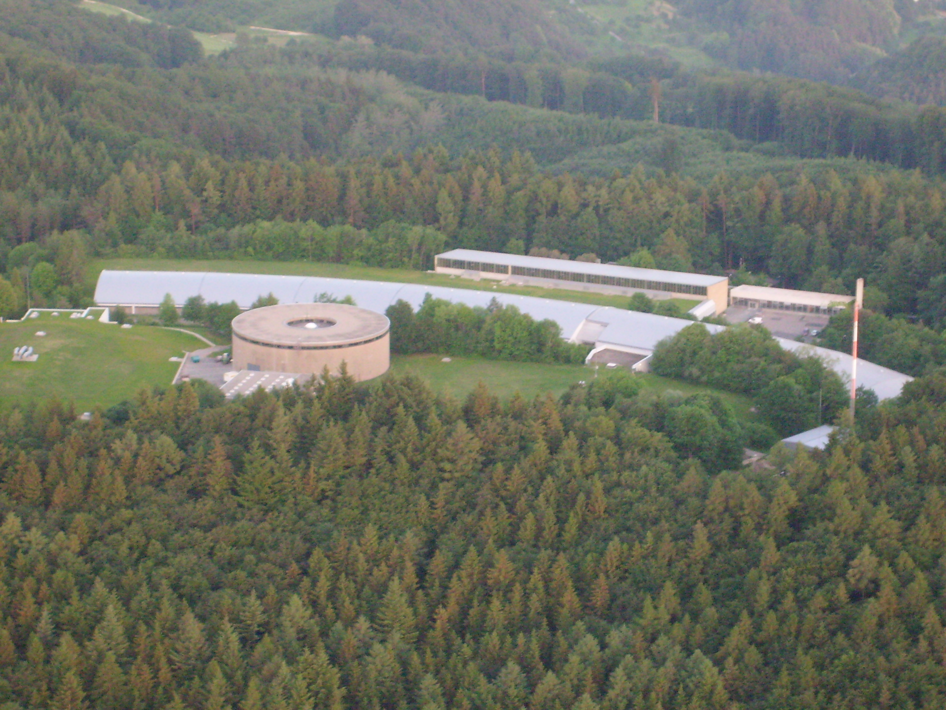 Gebäude der Bodensee-Wasserversorgung auf dem Sipplinger Berg